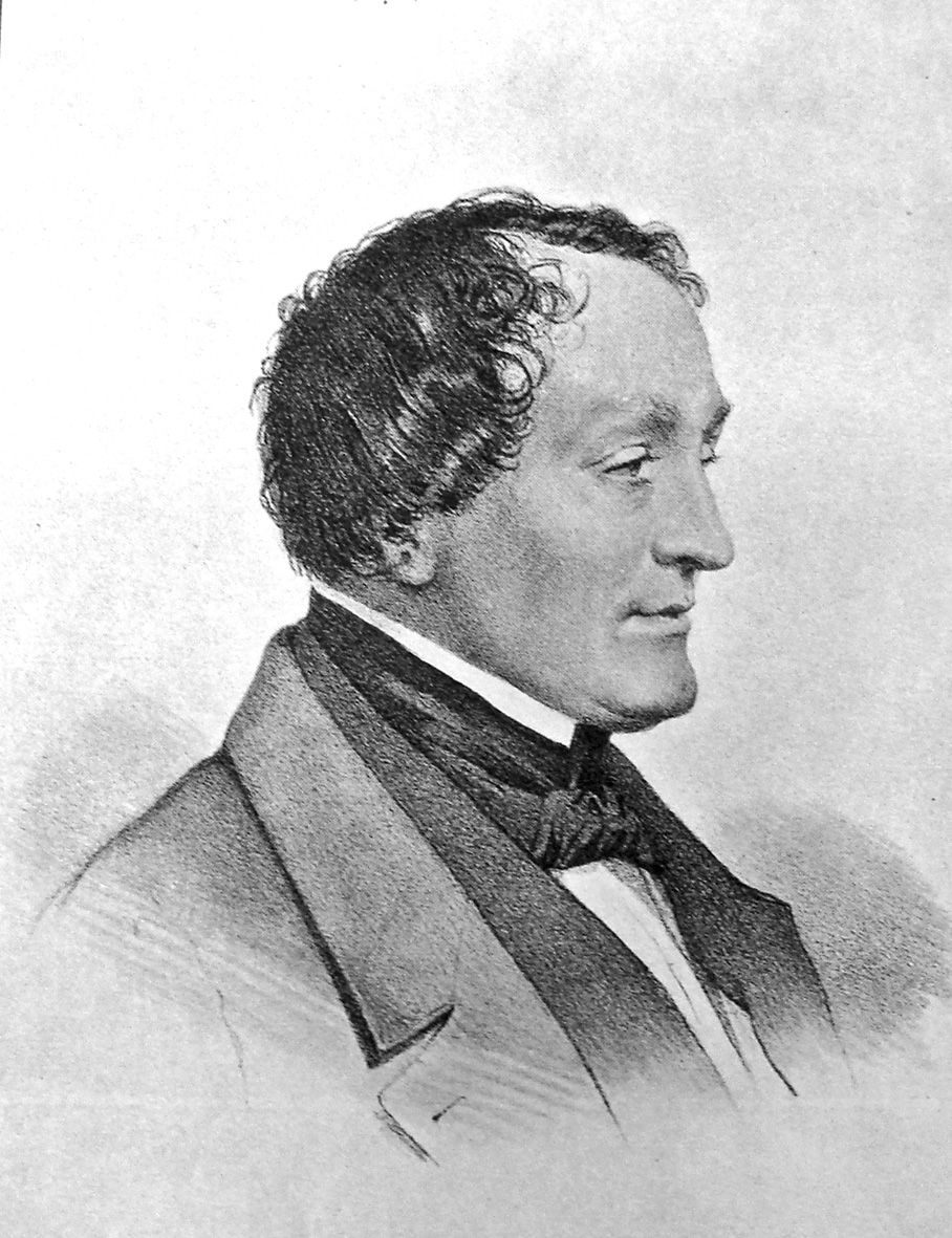 Joachim Ludvig Phister (1807-1896) var en dansk skuespiller.